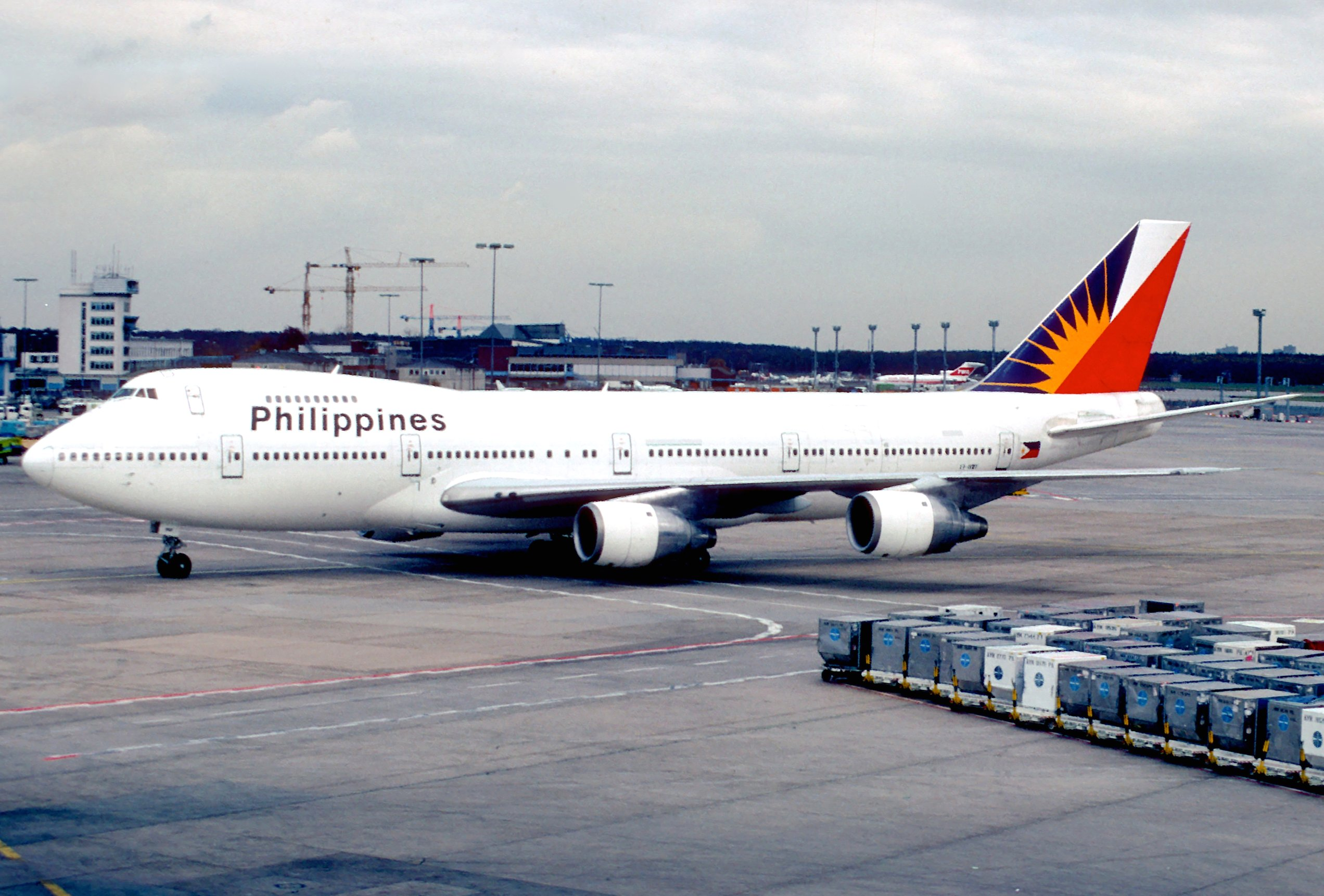 Philippine Airlines Boeing 747-283B (M); EI-BWF, December 1988